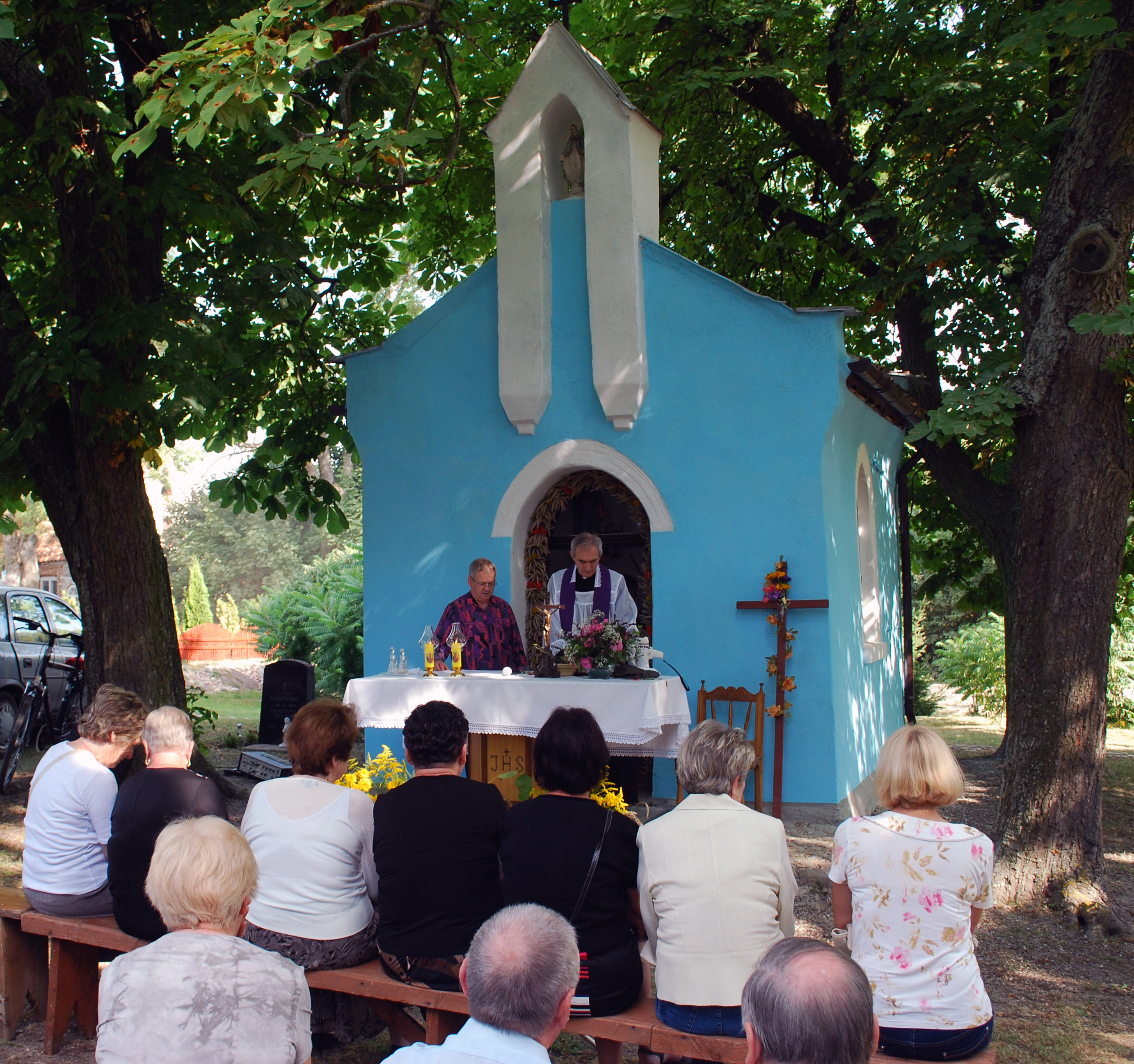 Pielgrzymka do kapliczki Matki Boskiej Częstochowskiej w Nowej Wsi Reszelskiej -poczętek mszy